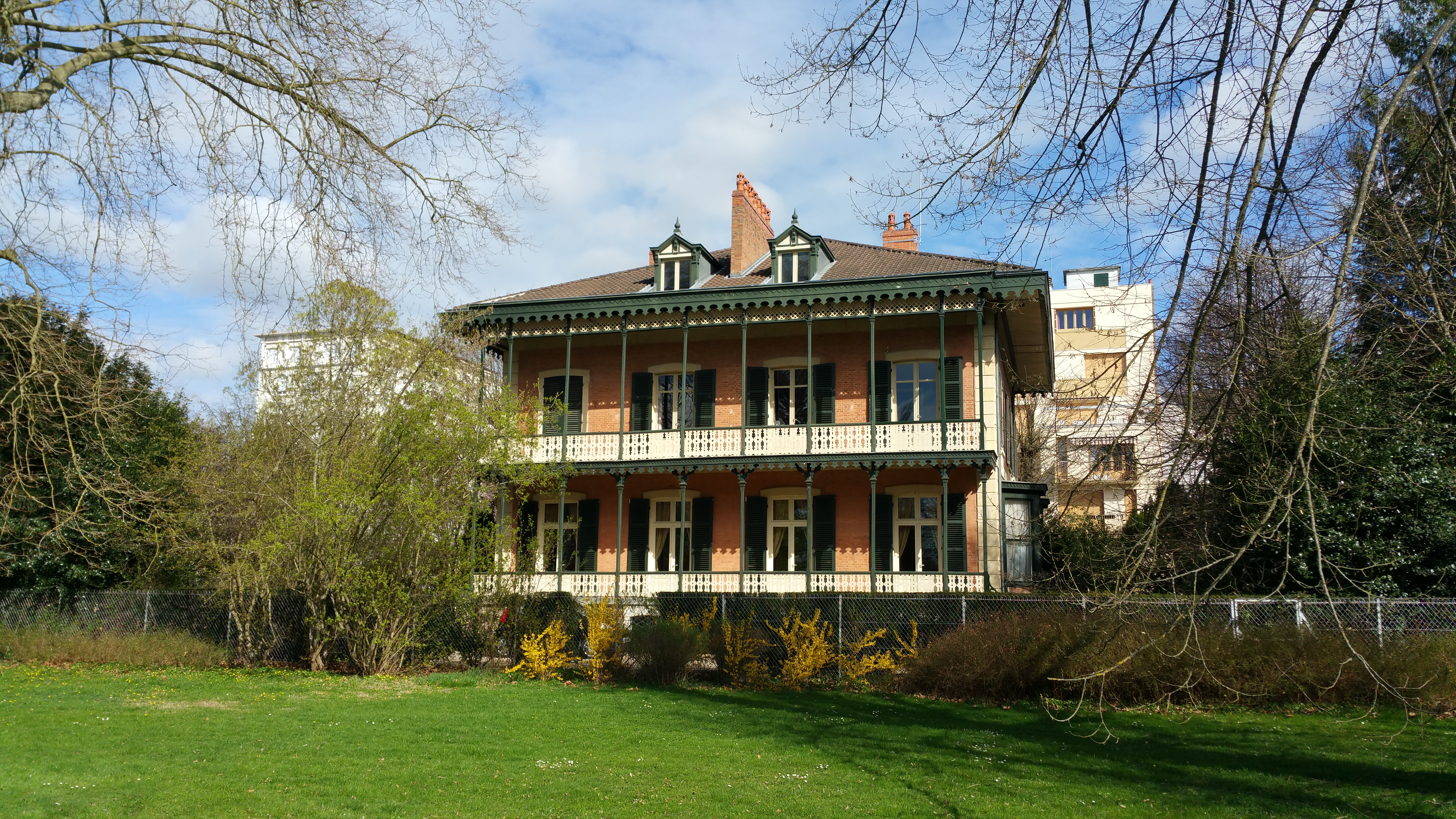 Chalets Napoléon III de Vichy vus du parc